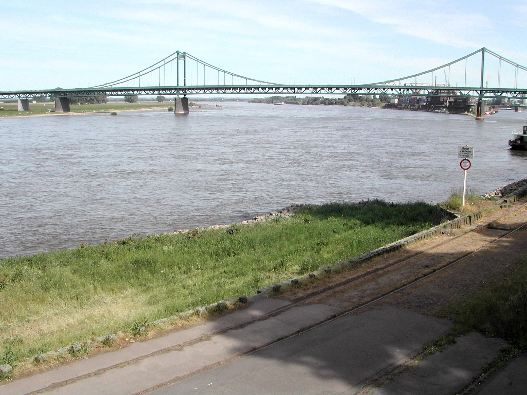 Rheinbruecke B288 (DU-KR)